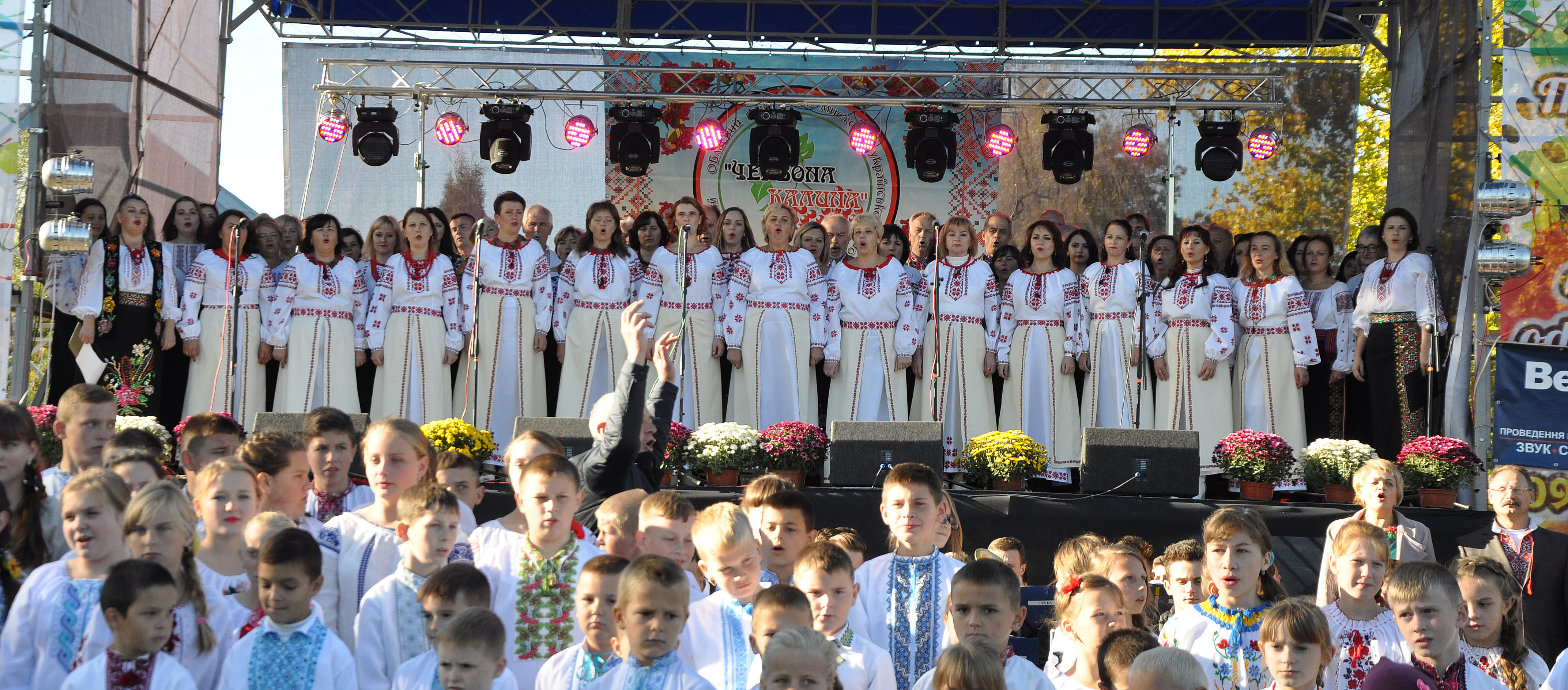 Хор «Галичина» Чортківської ЦКЛ